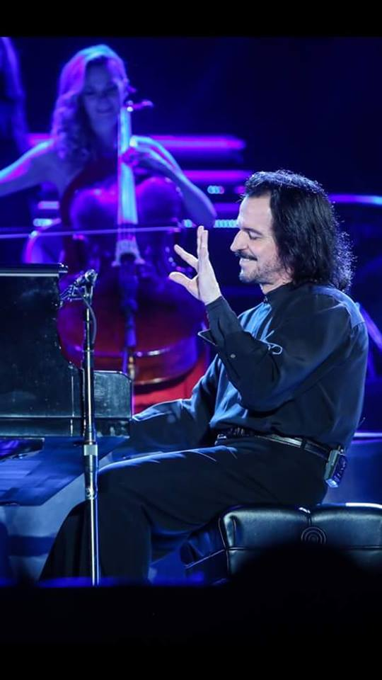 یانی 2017